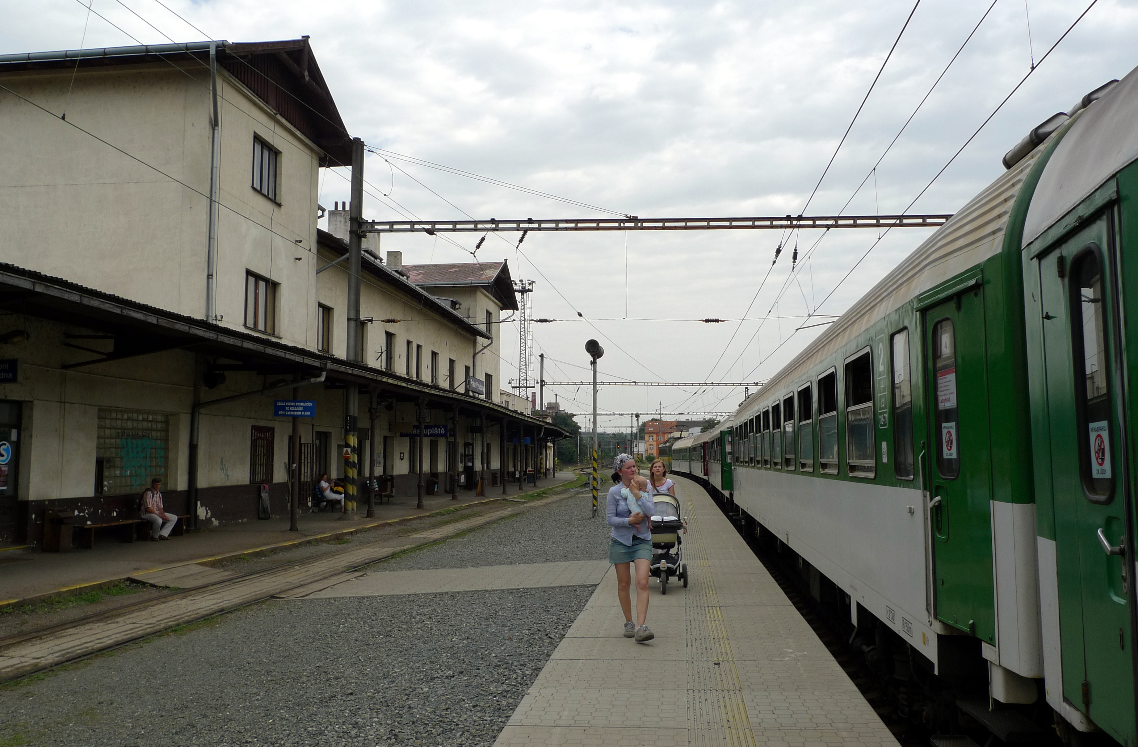 Nádraží Praha-Vysočany